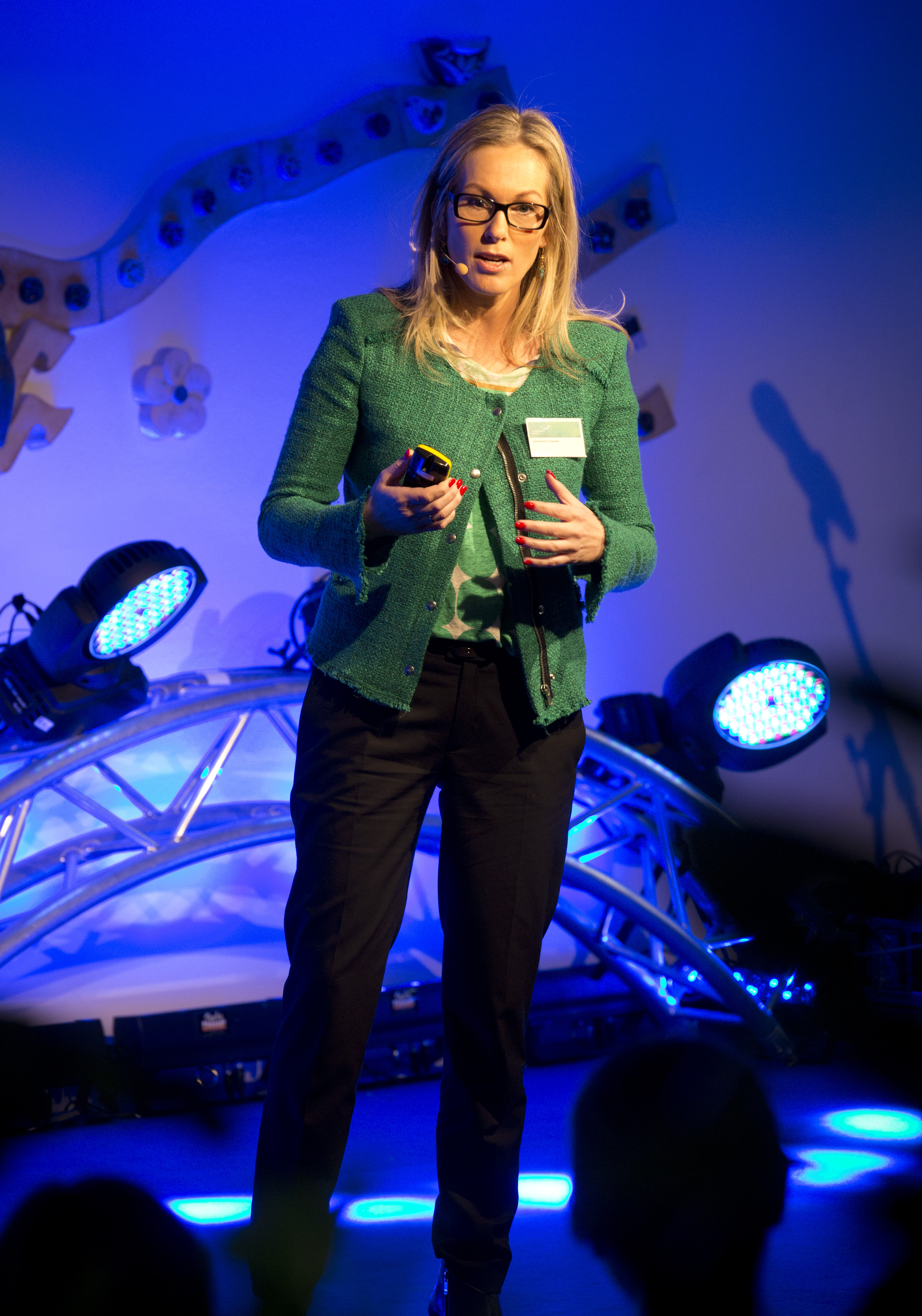 FOTO: Tom Hansen / Innovasjon Norge